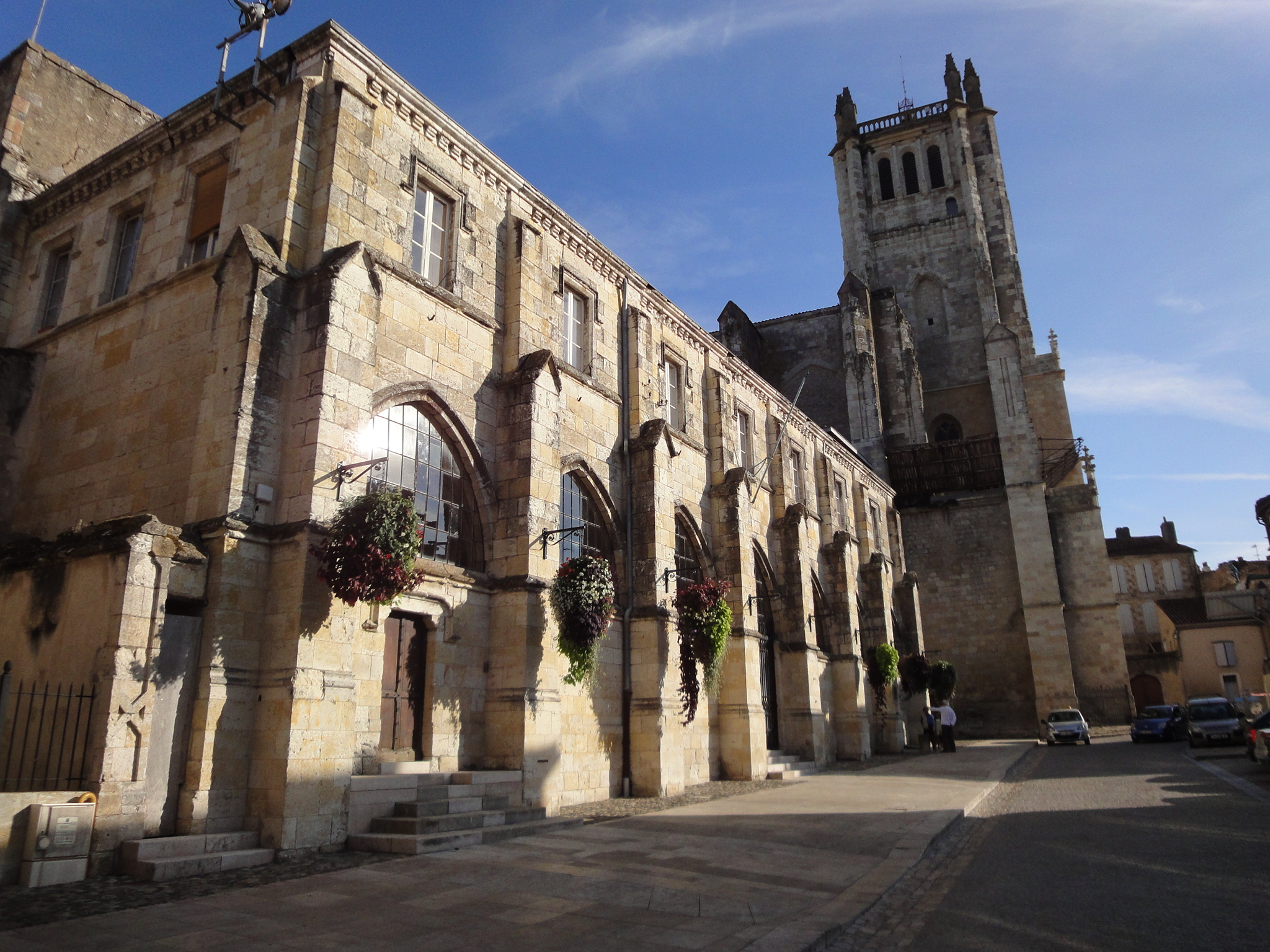 Ancienne cathédrale de Condom, actuellement église Saint-Pierre .